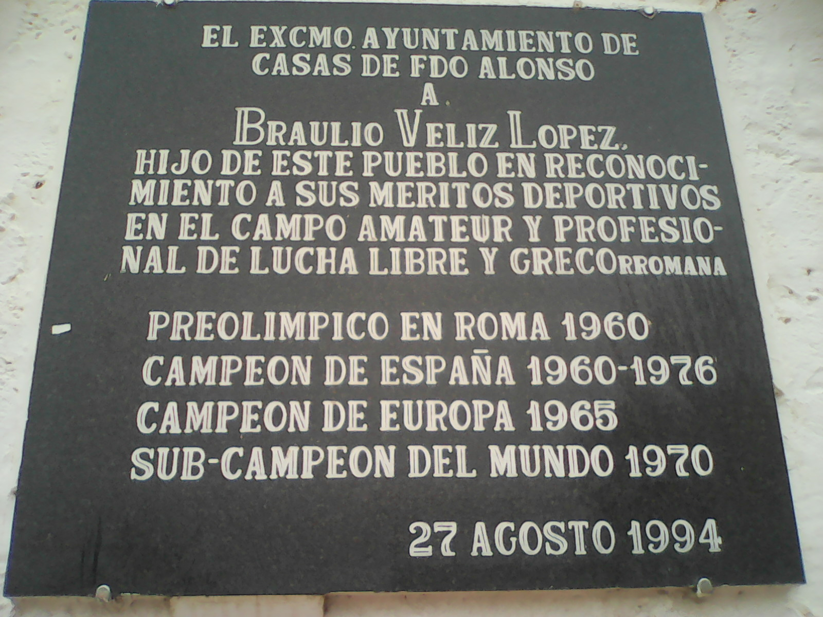 commemorative plaque